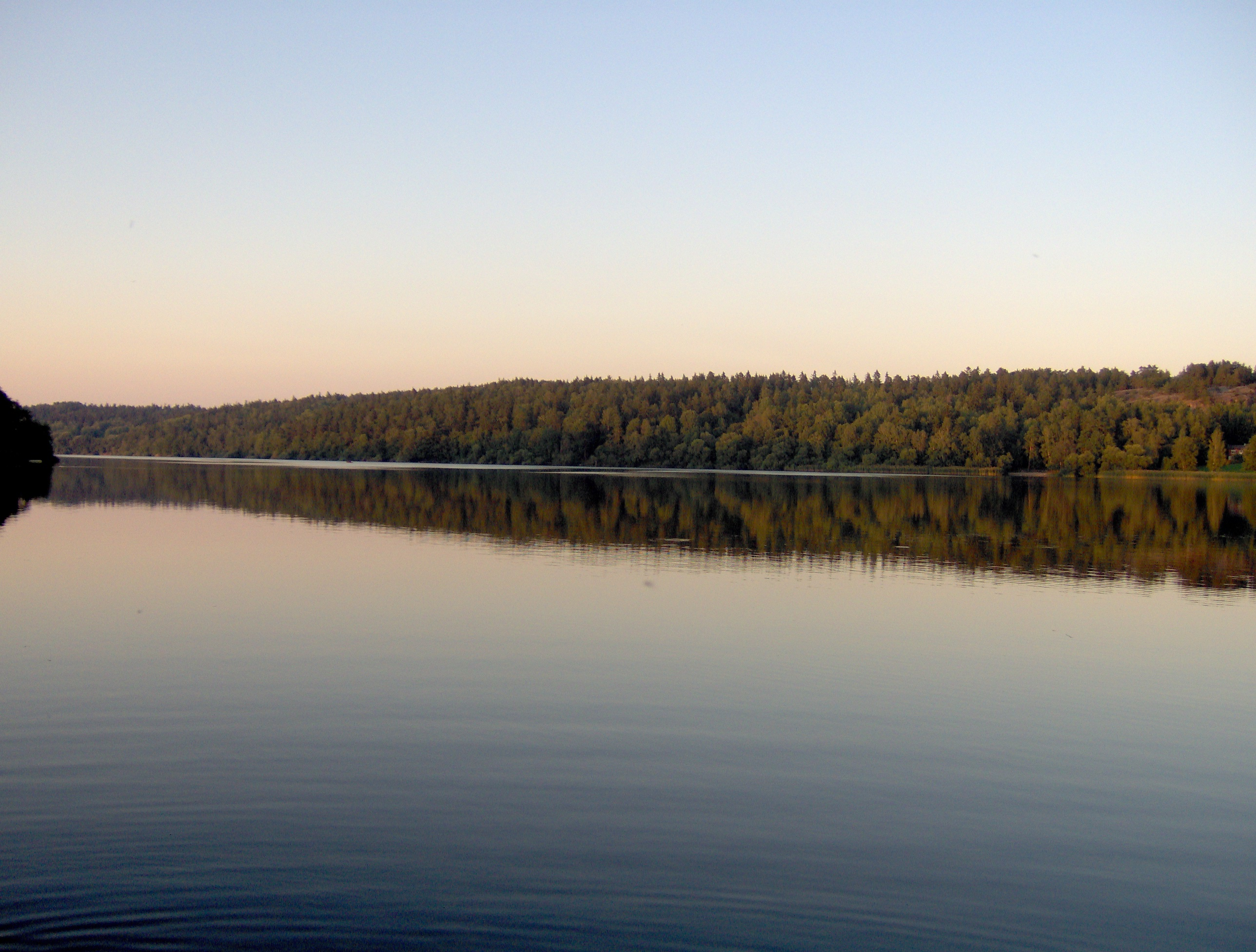 Lake Norrviken